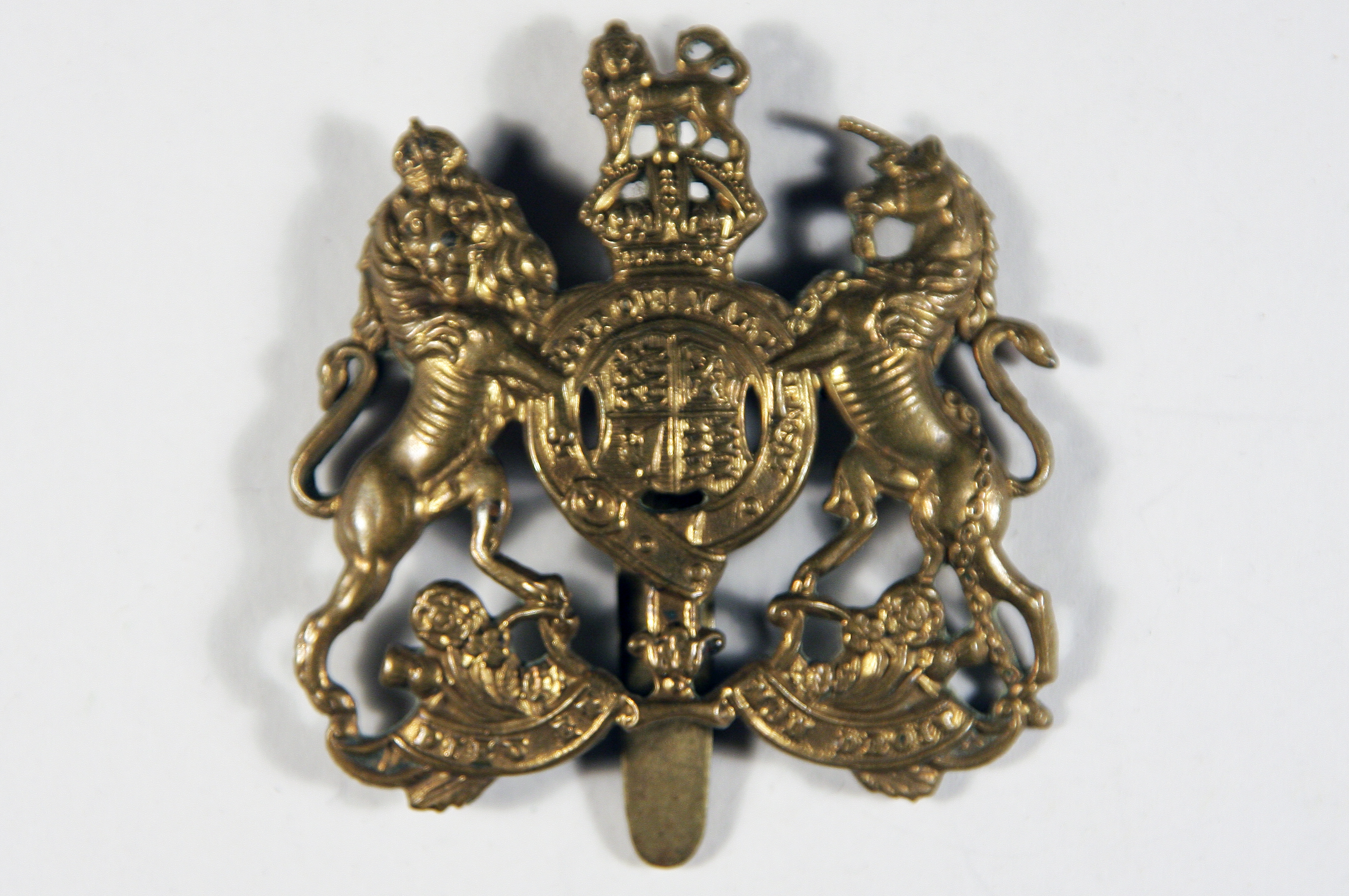 Ordenssammlung Erster Weltkrieg.